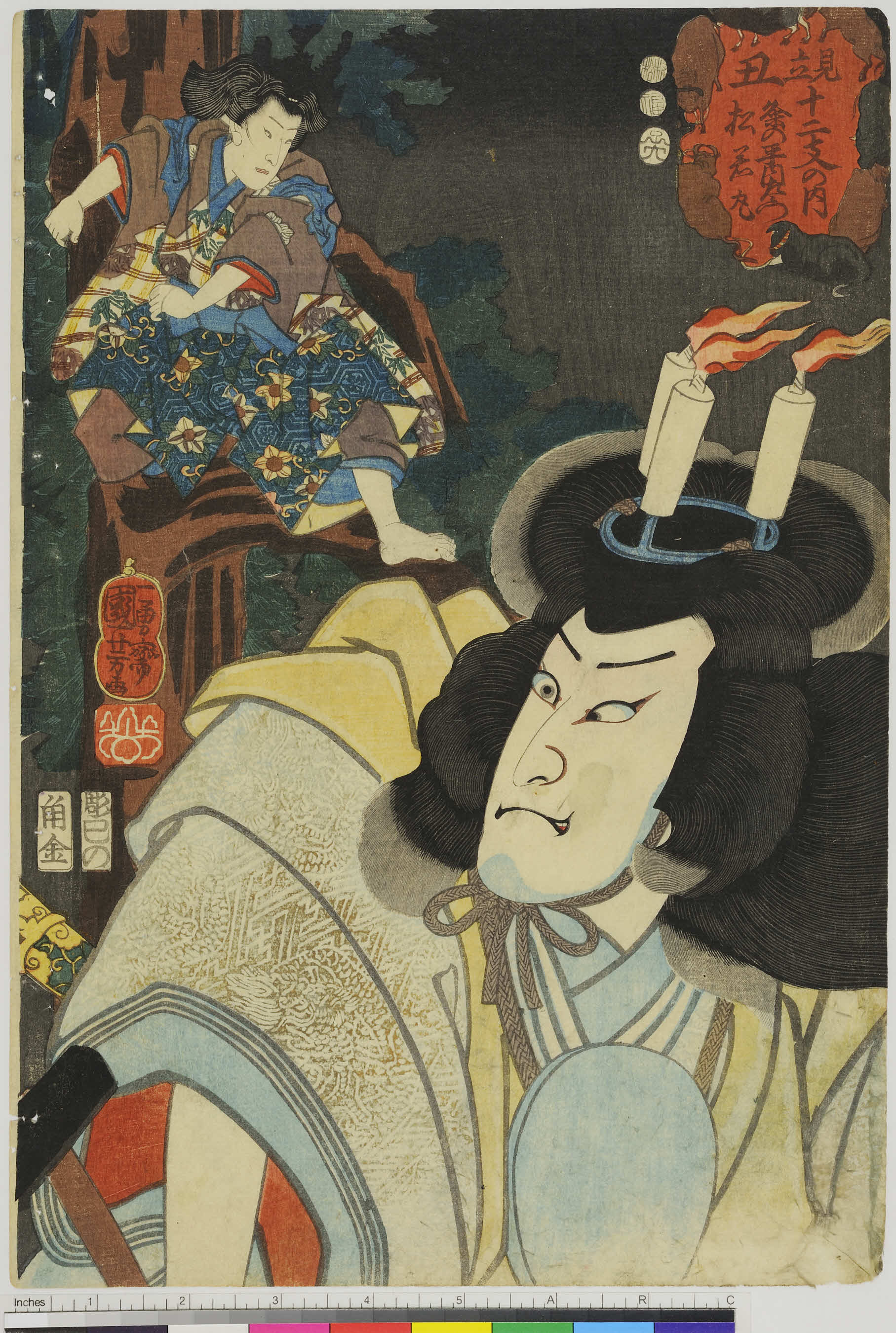 『見立十二支の内丑 粂平内左衛門・松若丸』、歌川国芳、1861年以前